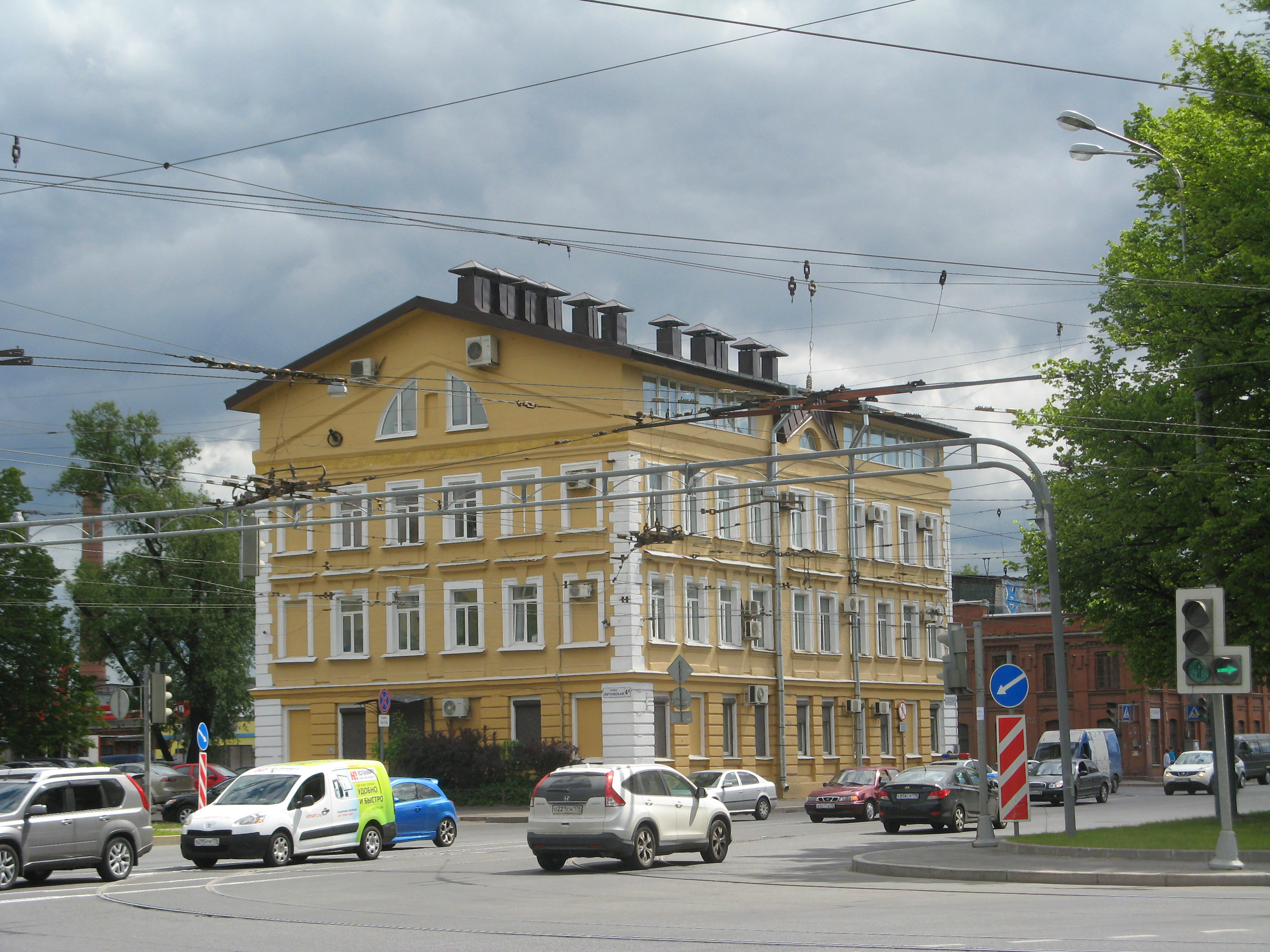 Санкт-Петербург, Литовская улица, дом № 4